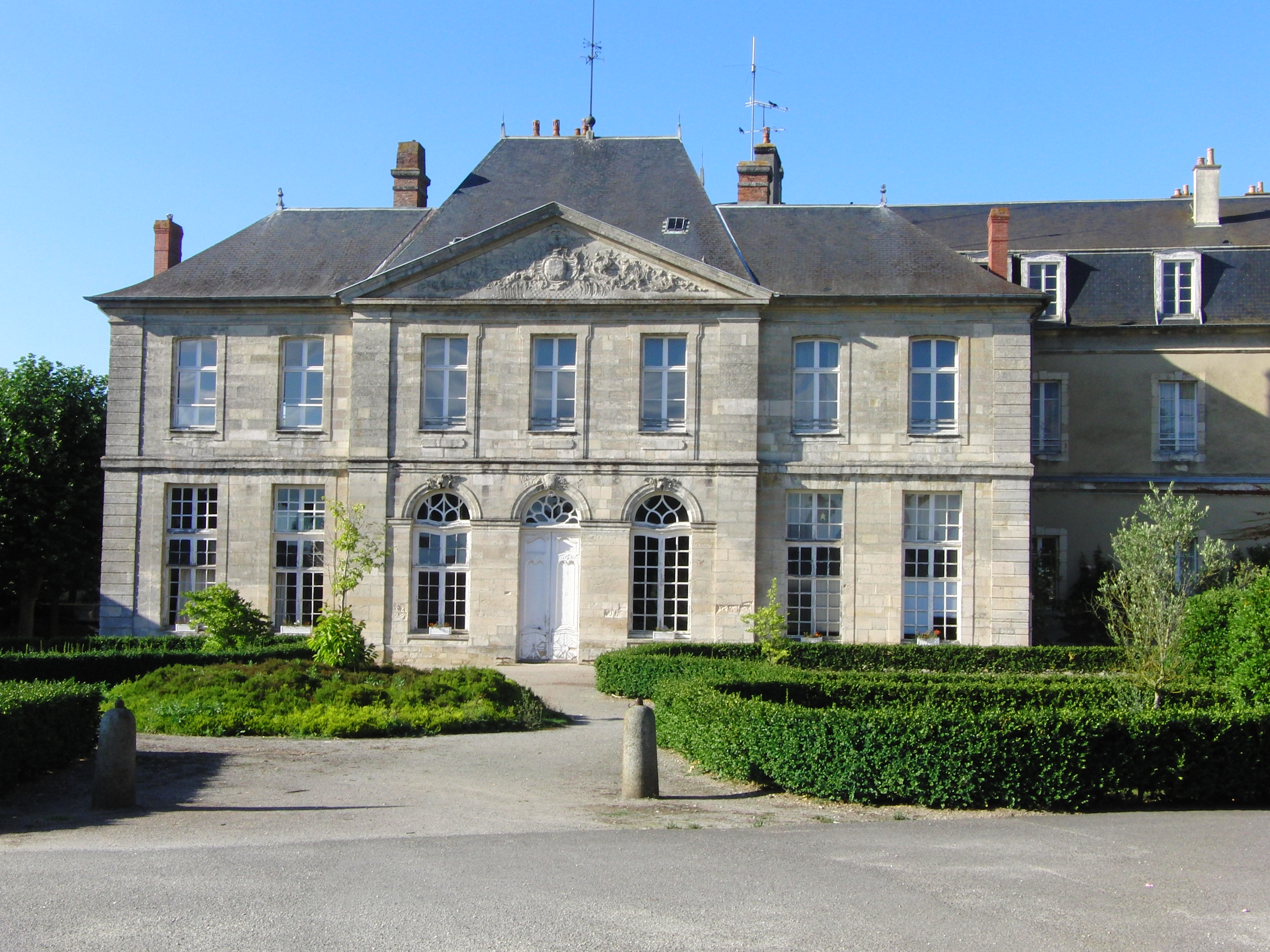 Abbaye Saint-Martin de Sées (Classé, Inscrit), Orne, France .